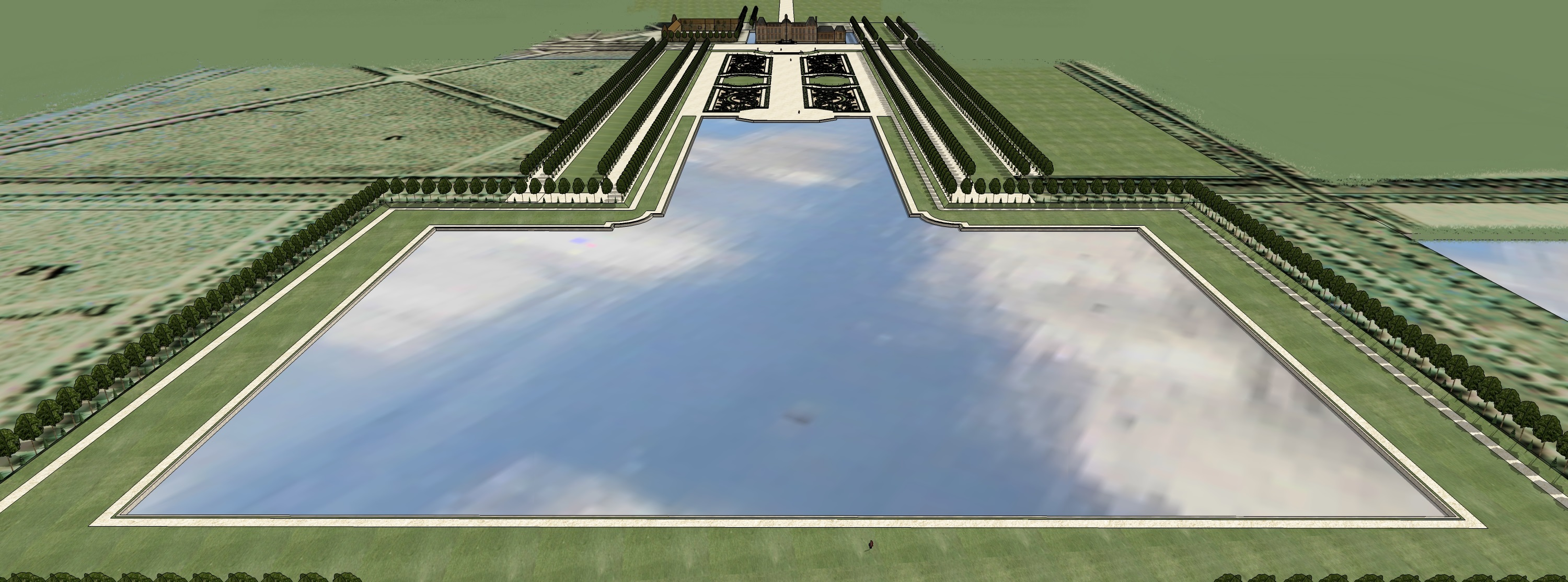 Vue cavalière de Pontchartrain, pour comparer la réalité avec le tableau de Pierre-Denis Martin